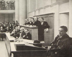 Foto di scena di Corte d'Assise (1930). Da Kinema, Rivista mensile illustrata di cinematografia, 1930. Coll. Museo Nazionale del Cinema, Torino. Bibliomediateca "Mario Gromo".